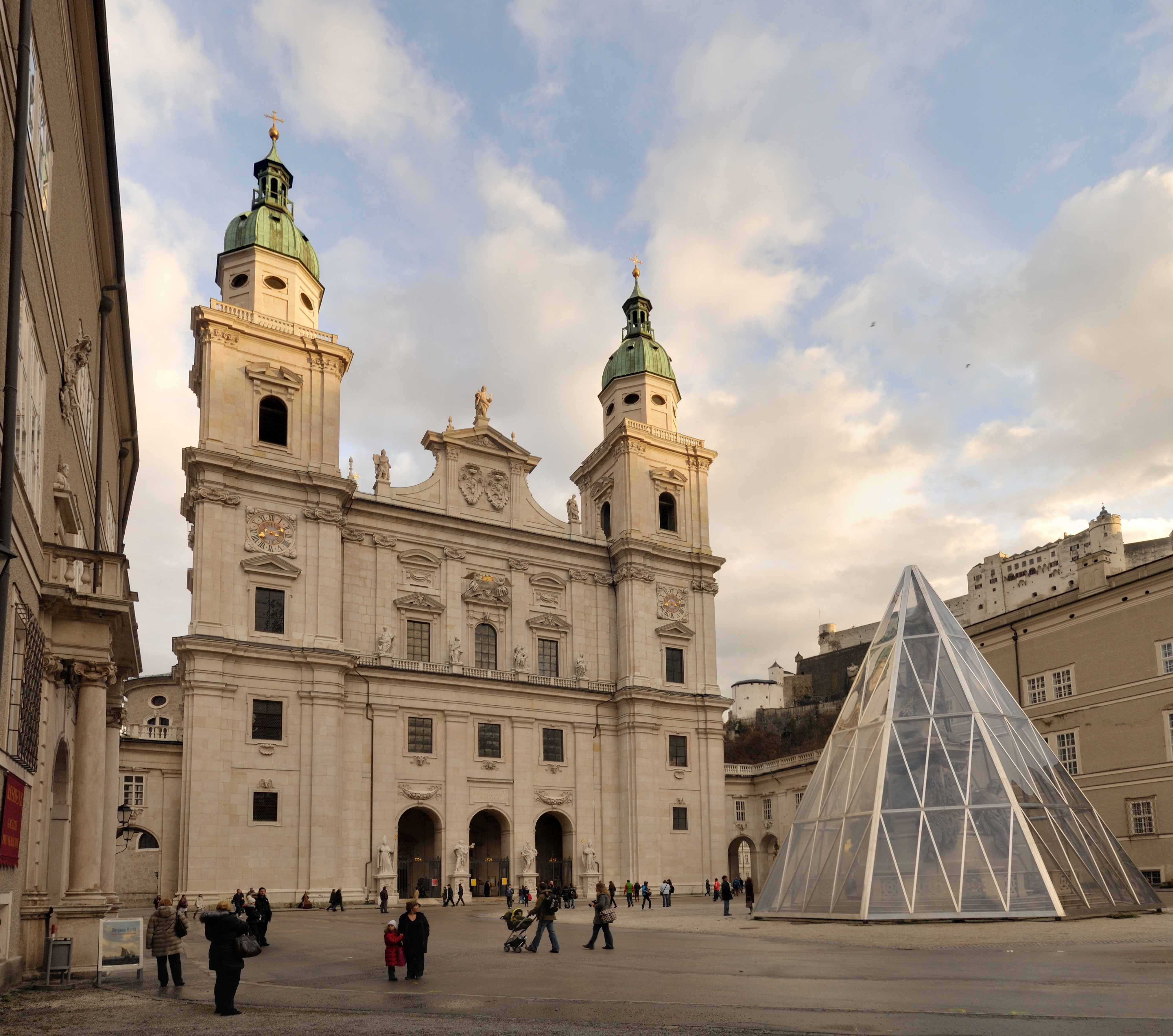 Salzburg: Dom